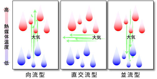 空冷式熱交換器の分類